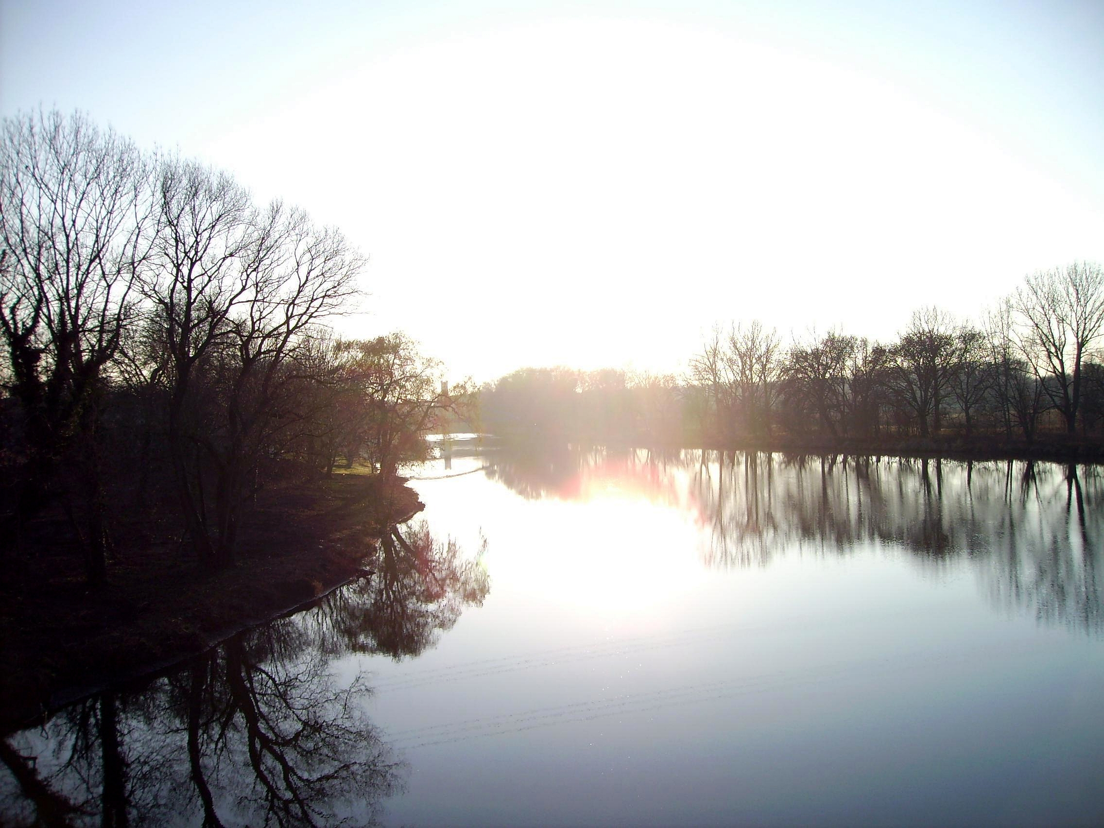 Blick auf die Saale von der Brücke der Rabeninsel in Halle (Saale) aus gesehen.